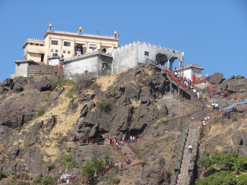 Pavagadh